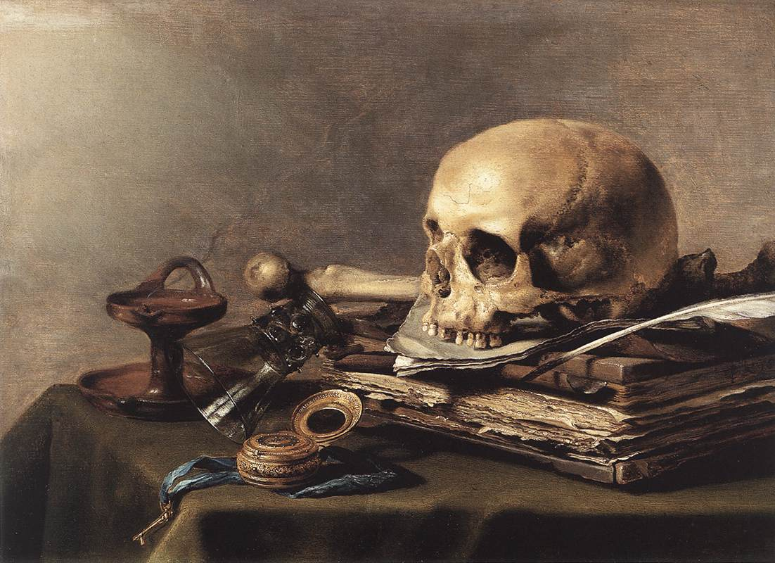 detail